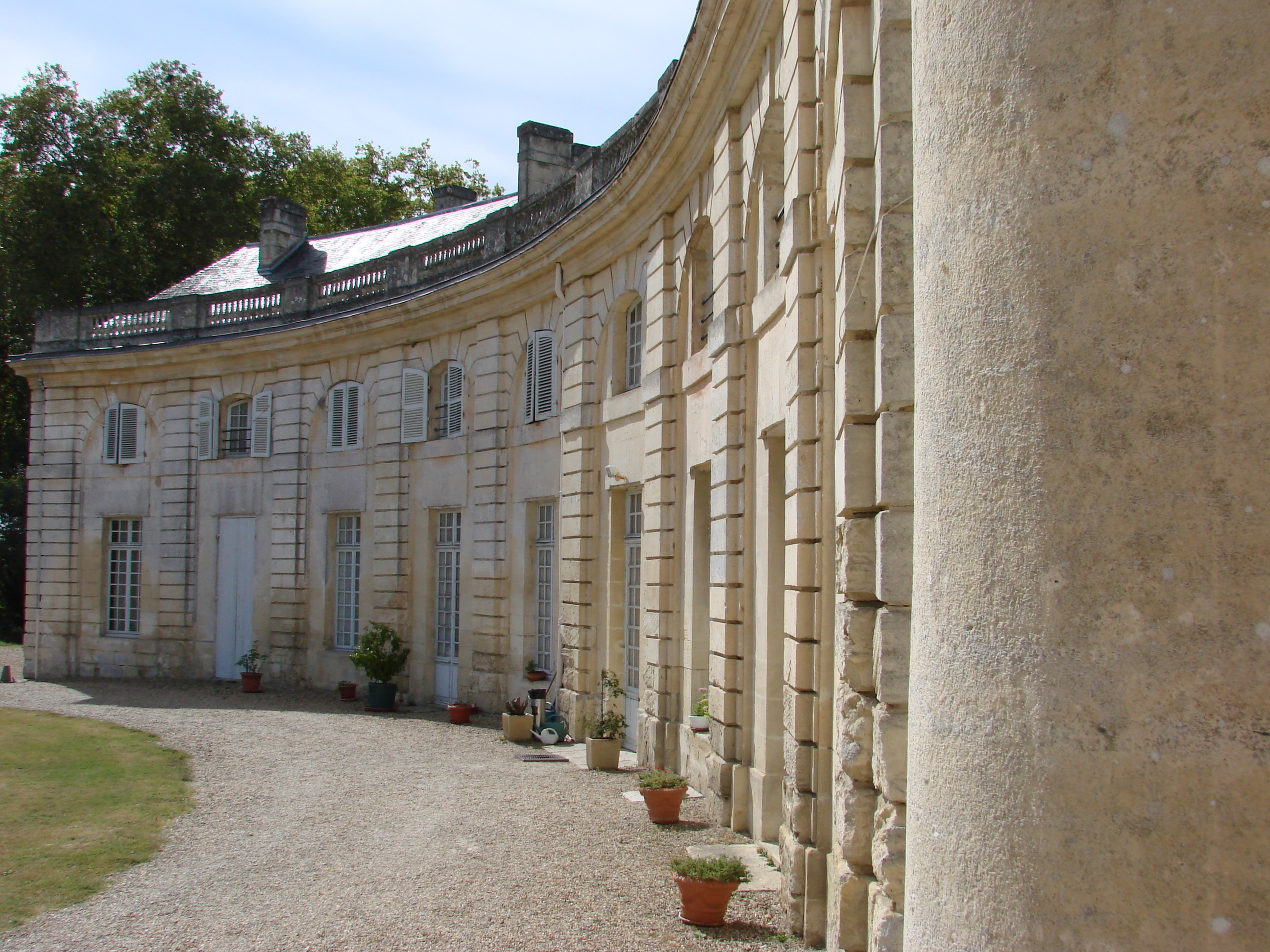 vue du corps de logis depuis le parc